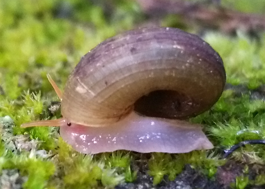 spécimen de Amphicyclotulus schrammi photographié sur la station de la Crète de Village (Bouillante, Basse-Terre) en octobre 2018